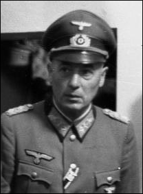 Generaloberst Friedrich Dollmann; aufgenommen im Frühjahr 1940